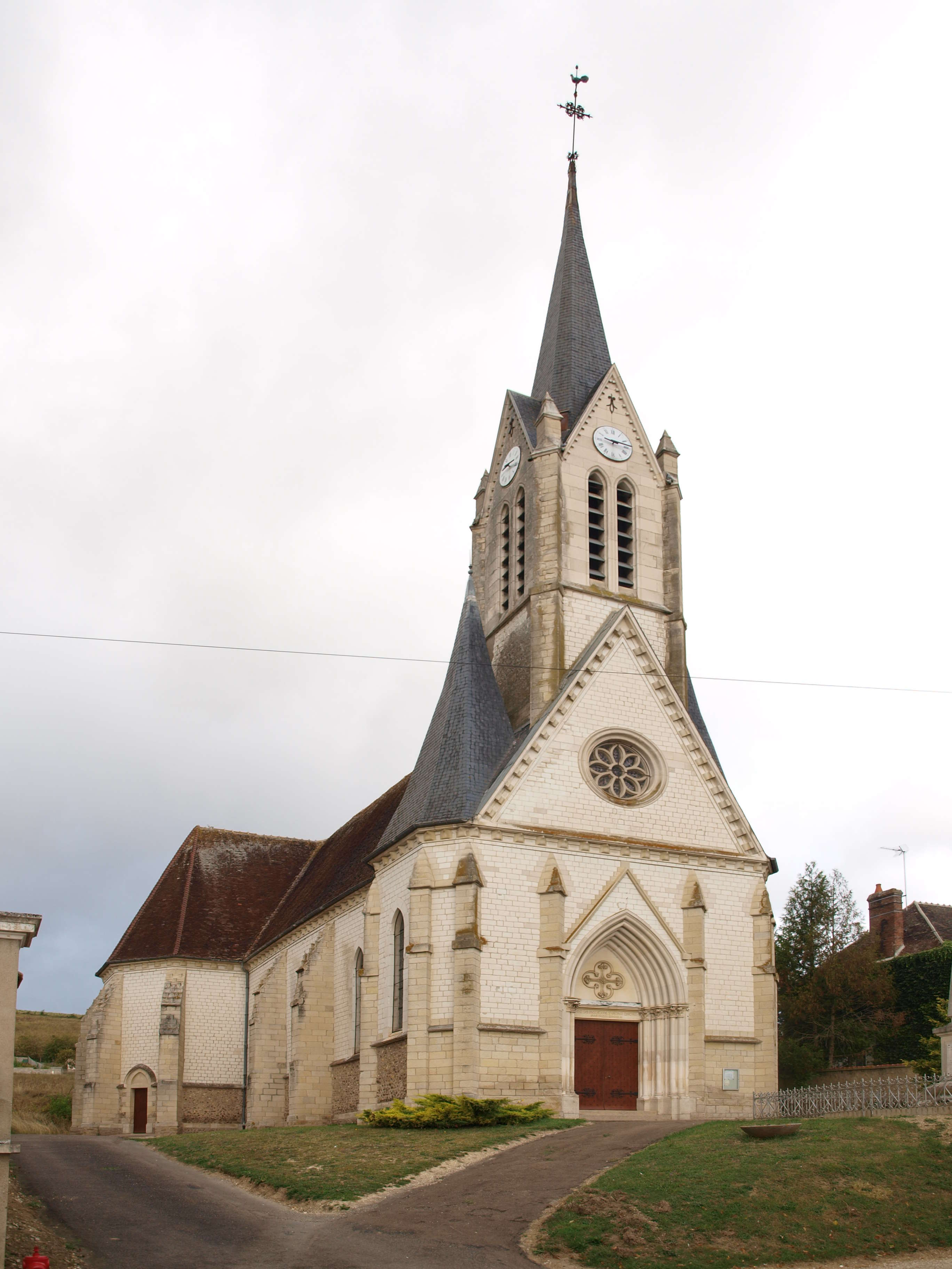 Champvallon (Yonne, France) ; église